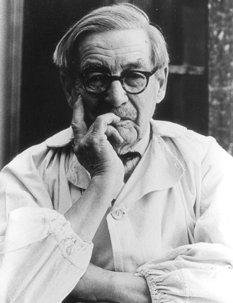 Fotografi av Gustaf Wolmar, u.å.(1950-tal) Originalets fotograf: okänd. Fotograf: C. Lannerup